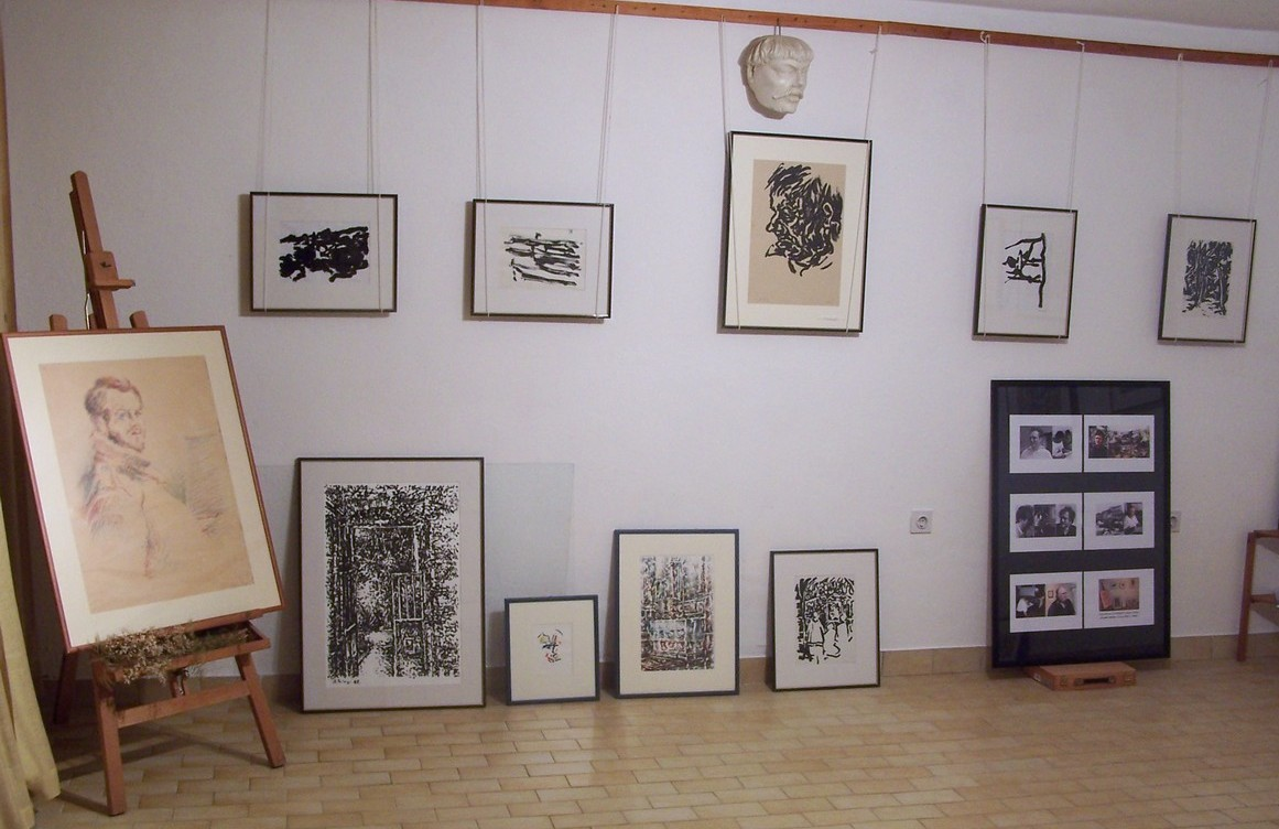 "offenes Atelier" von Nenad Levinger